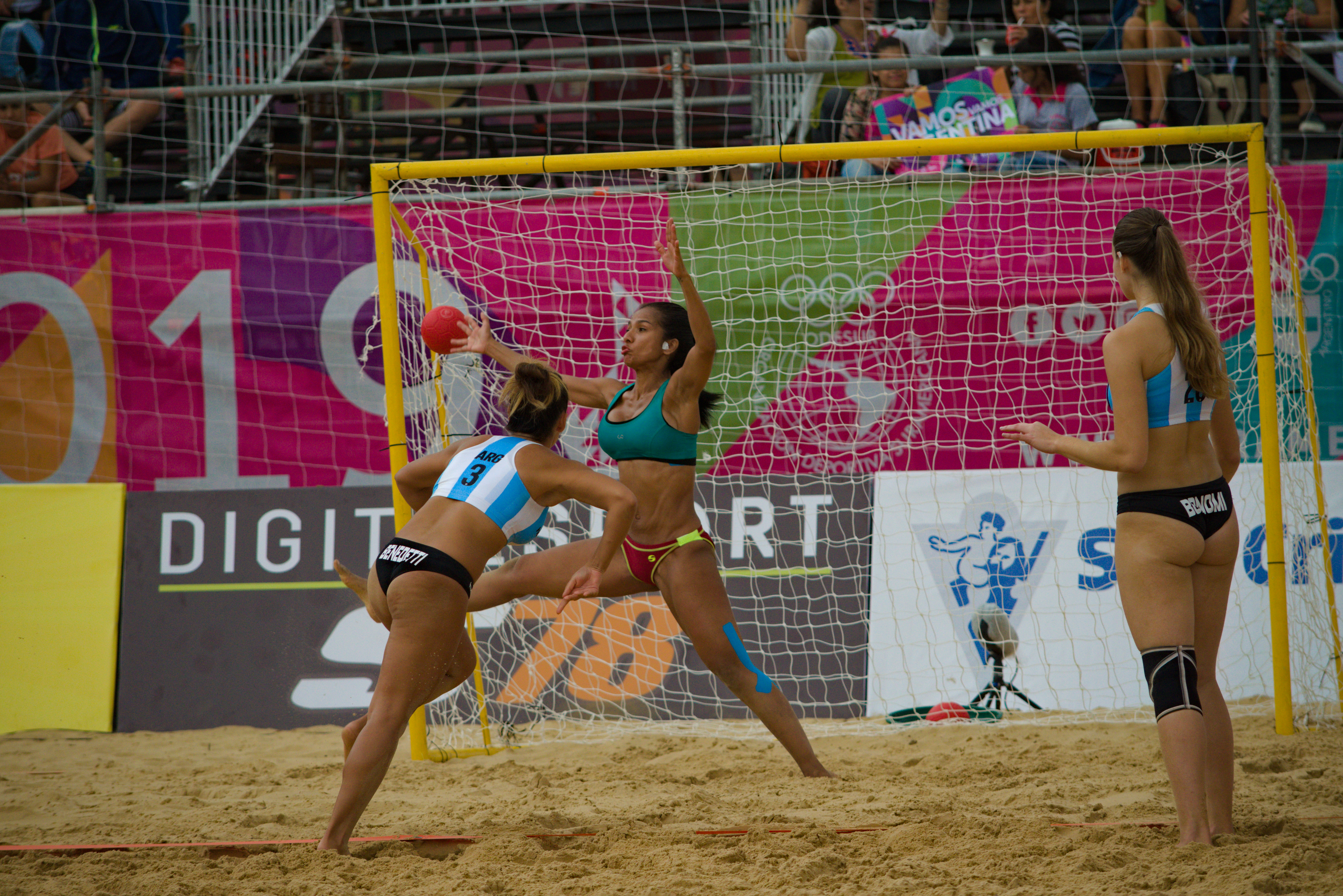 Partido de la semi-final femenina de handball entre Argentina y Venezuela en los Juegos Suramericanos de Playa 2019